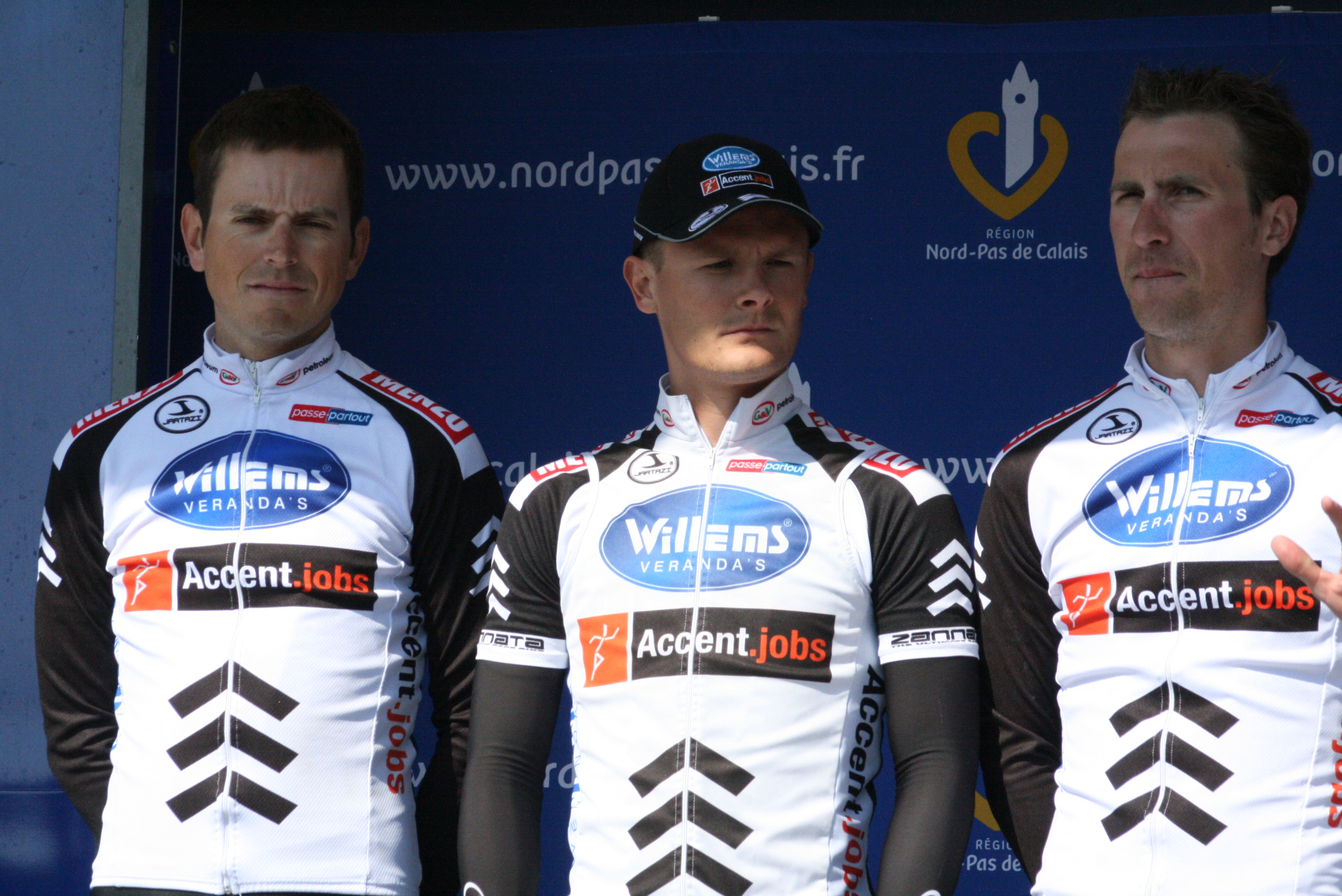 Jurgen Van Goolen, Steven Caethoven et Gregory Habeaux lors des Quatre jours de Dunkerque 2011